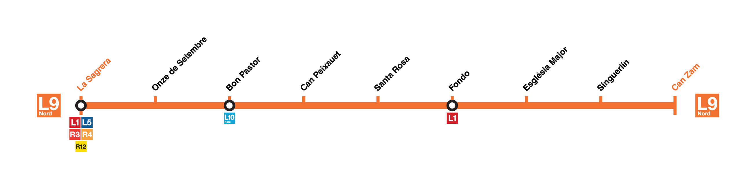 Termómetro de la línea L9 Nord del Metro de Barcelona